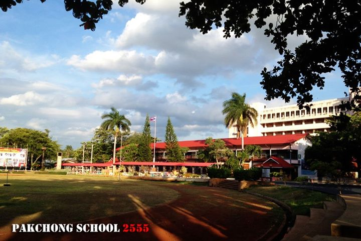 บรรยากาศยามเช้า